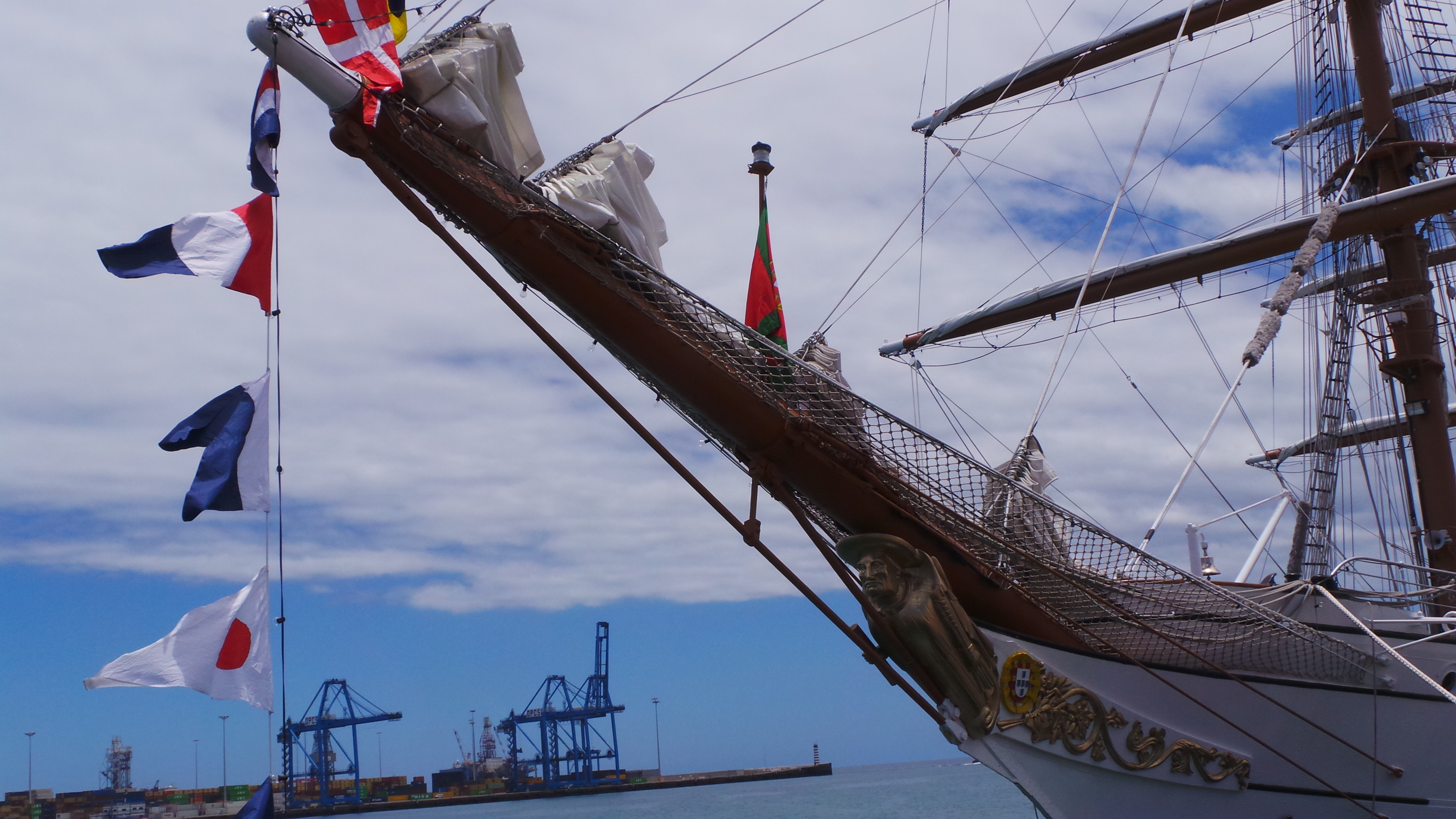 Visita al Buque Escuela NRP Sagres, en La Base Naval de Las Palmas de Gran Canaria. Este fin de semana de semana ( 20, 21 y 22 de junio de 2014) tenemos la oportunidad de disfrutar, en Las Palmas de Gran Canaria, de la visita del buque escuela portugués NRP Sagres, se encuentra atracado en el muelle de la base naval y podrá ser visitado hoy viernes hasta las 19h y mañana sábado de 10 a 12h y de 14 a 19h . El Buque proveniente de Lisboa partirá el domingo hasta Las Azores , para luego regresar a Lisboa, cuenta con unos 60 guardiamarines, con una decena de mujeres entre ellos, que realizan su periodo de instruccion Construido en 1937 en Hamburgo y tras varios avatares, fue adquirido en 1961 por la marina Portuguesa para sustituir al Sagres II, entrando en servicio como Sagres III en febrero de 1962. Tiene 89,5 metros de eslora, 12 de manga y 5,5 de calado, siendo su altura máxima de 45,5 metros. Cuenta además con 1.971 metros cuadrados de vela y desplaza 1.893 toneladas. La figura del mascarón de proa del Sagres III es el Infante D. Henrique nacido el 4 de marzo de 1394, siendo uno de los impulsores de la expansión y descubrimientos portugueses de la época. Más información del Buque : Web del Buque